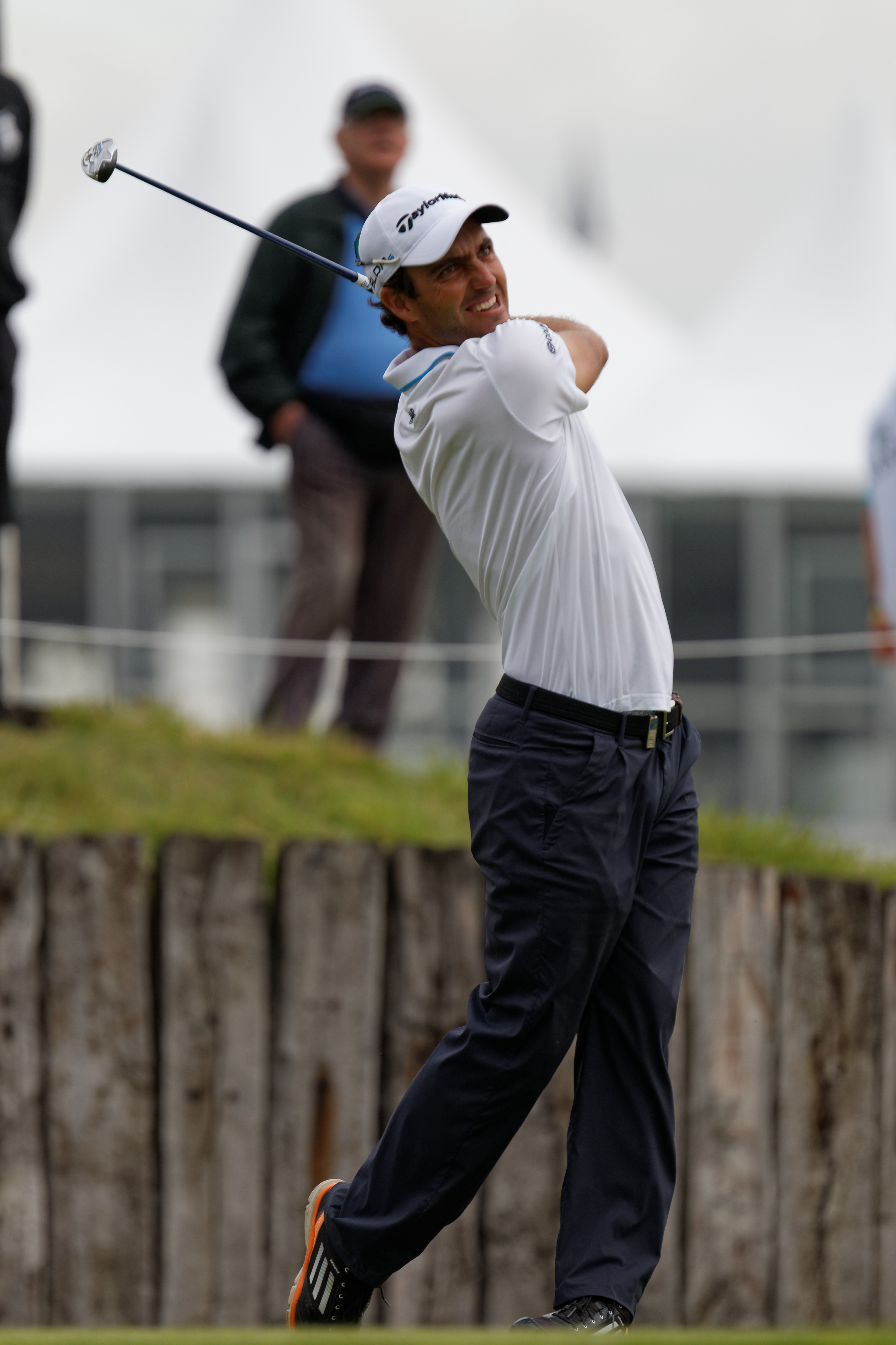 Edoardo Molinari lors du second tour de l'Open de France 2014 - Golf National - Saint-Quentin-en-Yvelines (78)